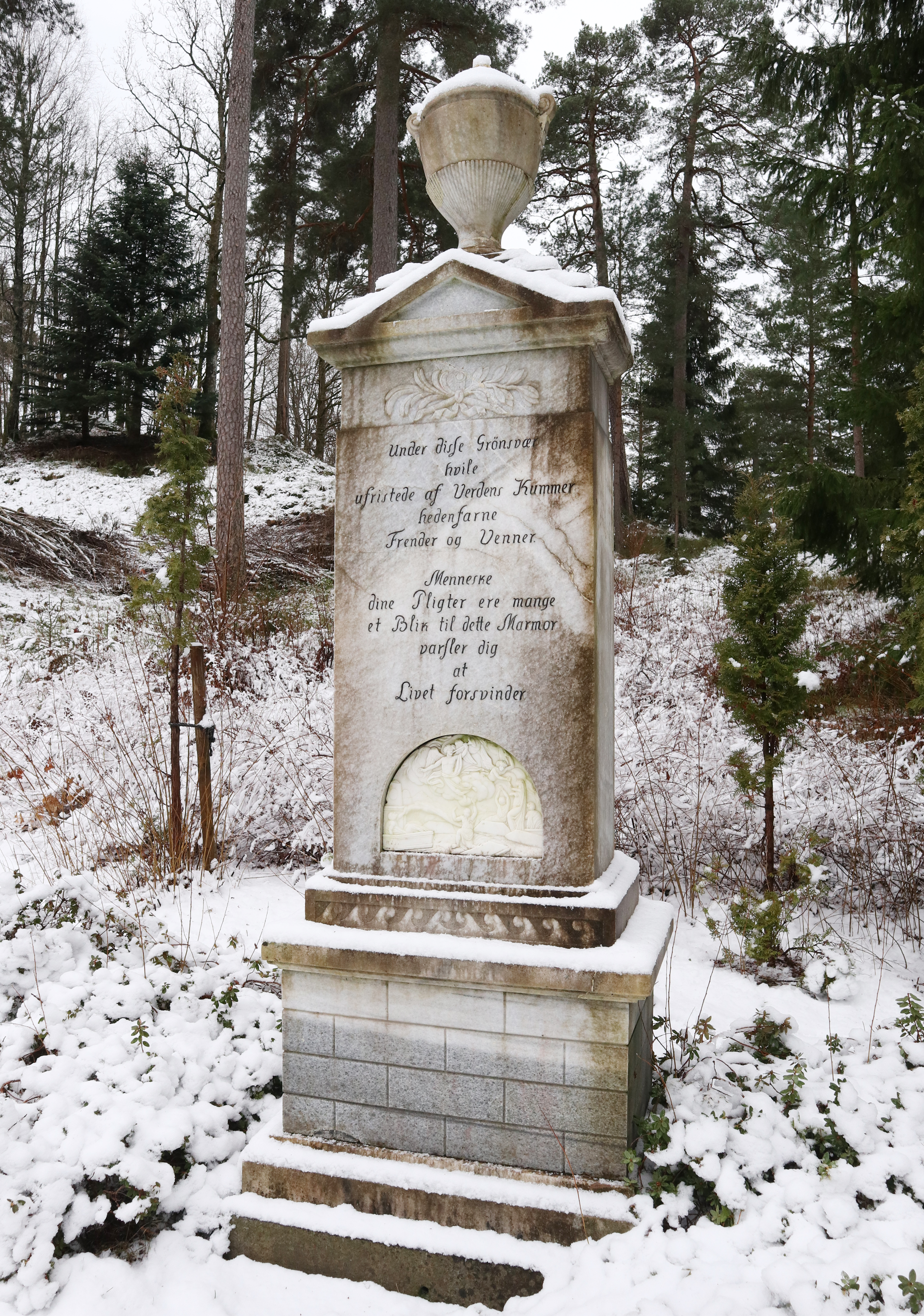 Minne på Arendal kirkegård oppsatt av Fürst